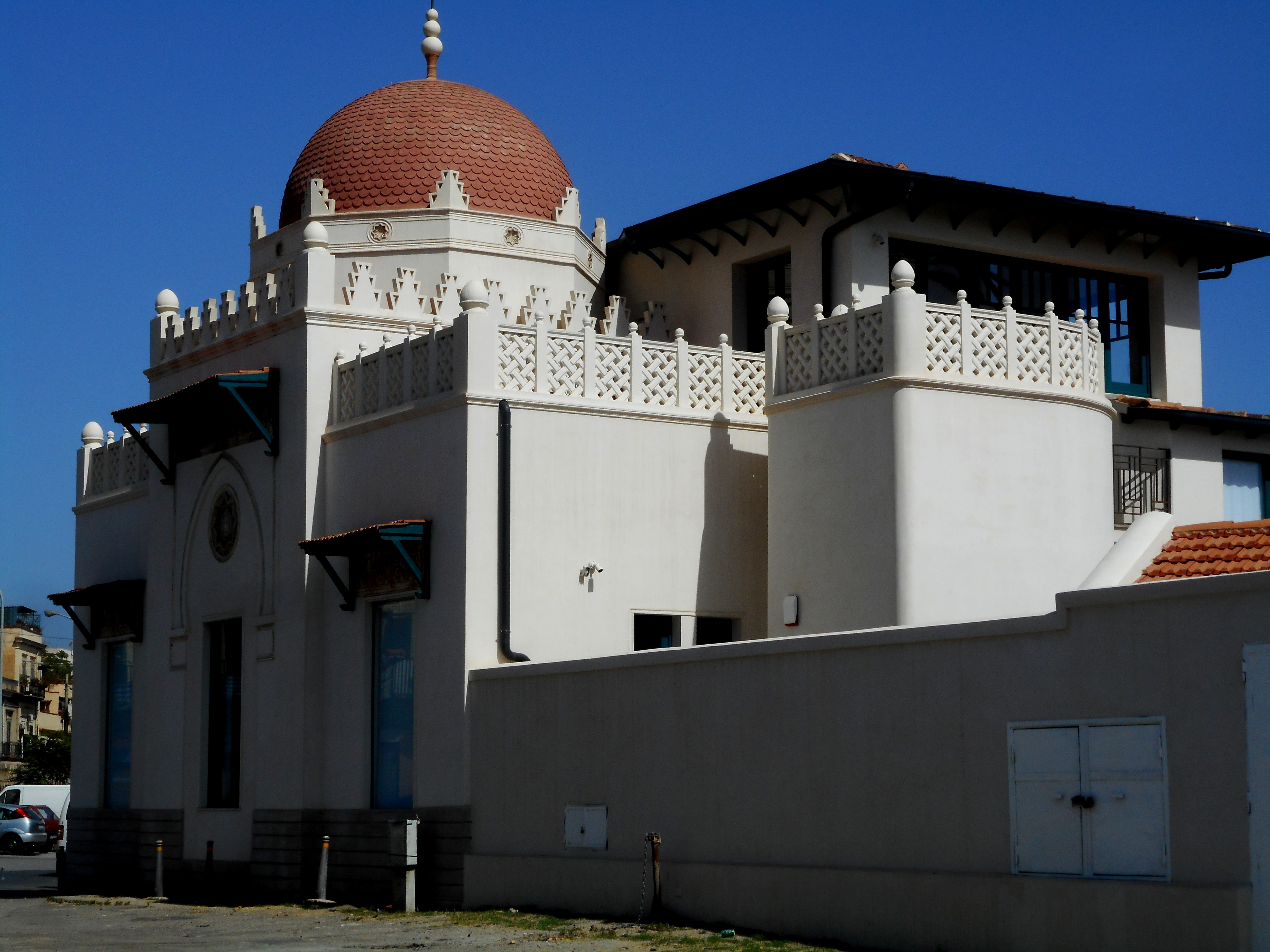 Stand Florio a Romagnolo